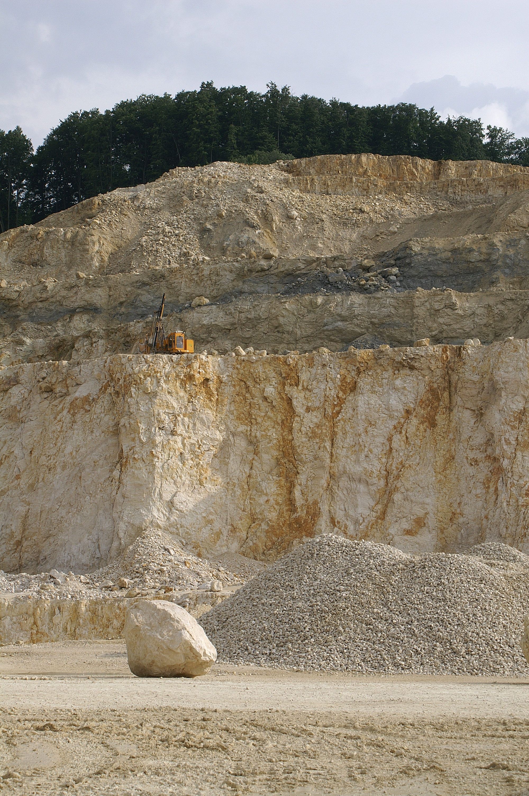 Steinbruch im Blautal bei Gerhausen zwischen Blaubeuren und Blaustein. Abgebaut wird Kalkstein des Weißen Jura. Kohlensaures Wasser löst(e) auch hier den Kalkstein und bildet Klüfte, Spalten, Höhlen. Die Klüfte sind deutlich sichtbar, in ihnen sammelte sich (vorwiegend tropisch verwitterter) bräunlicher Lehm.